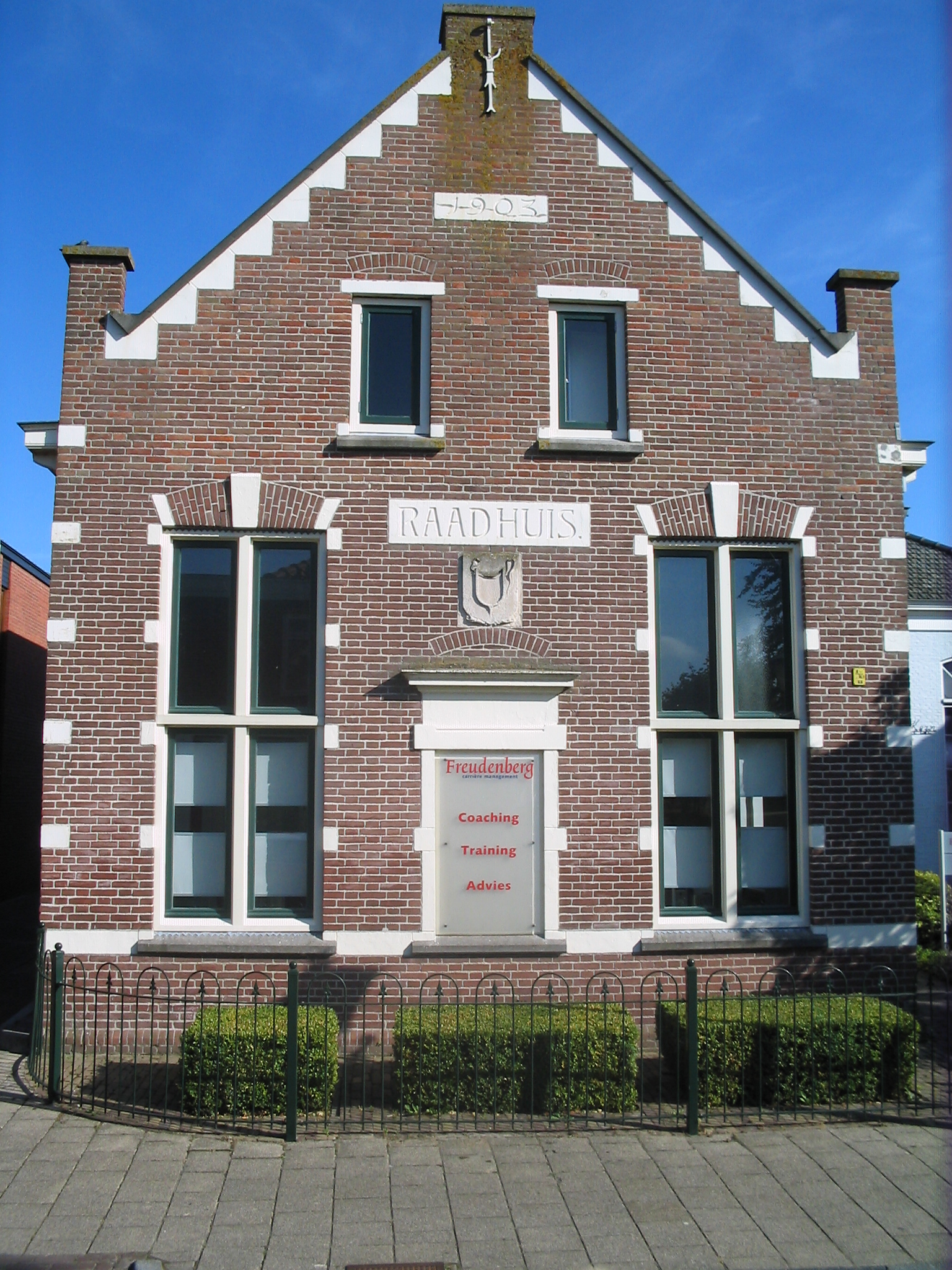 Stad: Hellevoetsluis, Voormalig dorp: Nieuw Helvoet, Wijk: Noordwest, Straat: Smitweg, Details: Raadhuis met wapen van nieuw-helvoet, Anno 1903